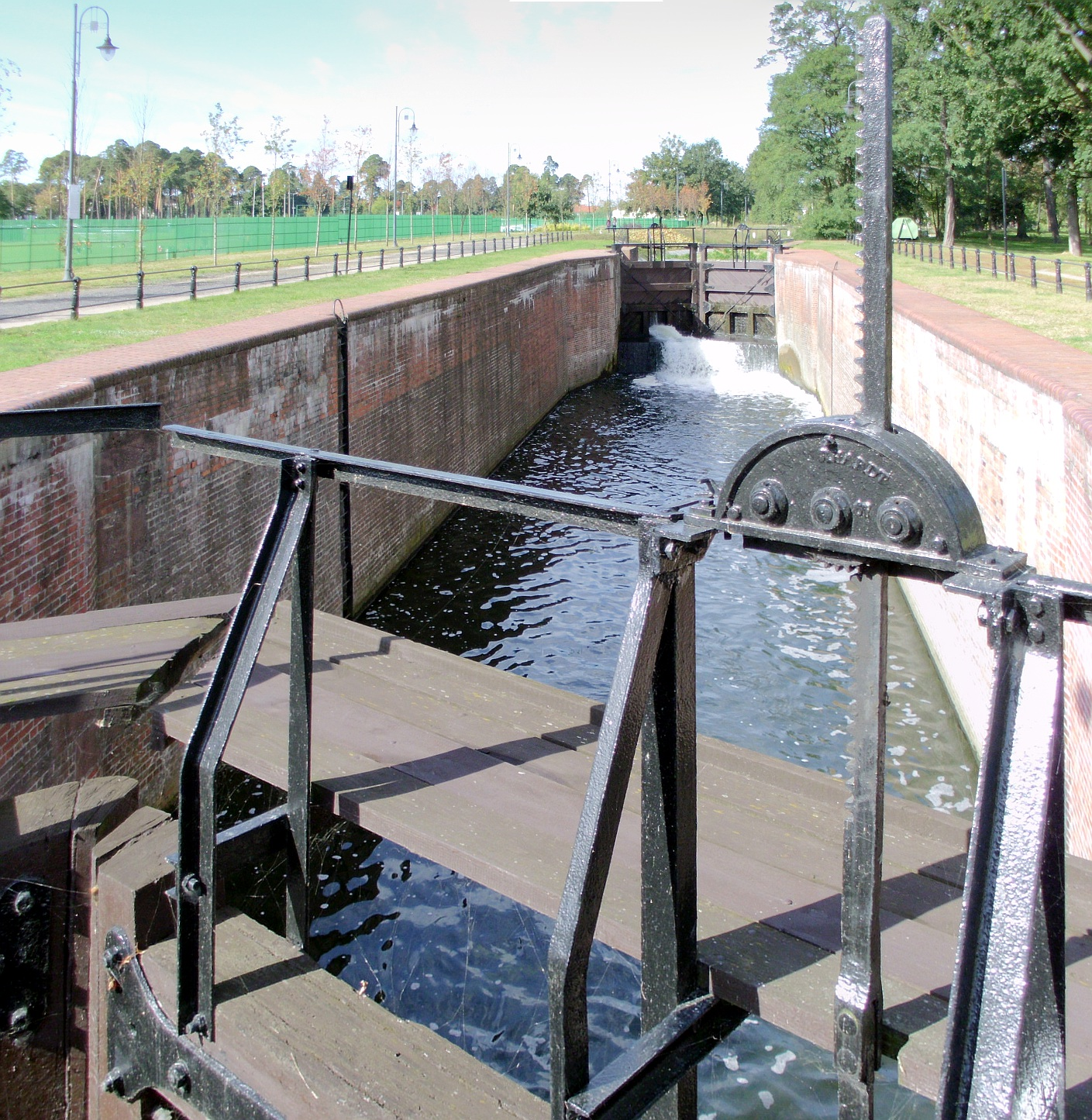 zespół Kanału Bydgoskiego (Starego i Nowego), 1773-1774, 1908-1815: szlak wodny z urządzeniami hydrotechnicznymi (9 śluz, 1 jaz) 6 budynków maszynowni 2 budynki sterowni 3 budynki obsługi 5 budynków mieszkalnych („dom śluzowego”) Bydgoszcz - Kanał Bydgoski, miasto Bydgoszcz